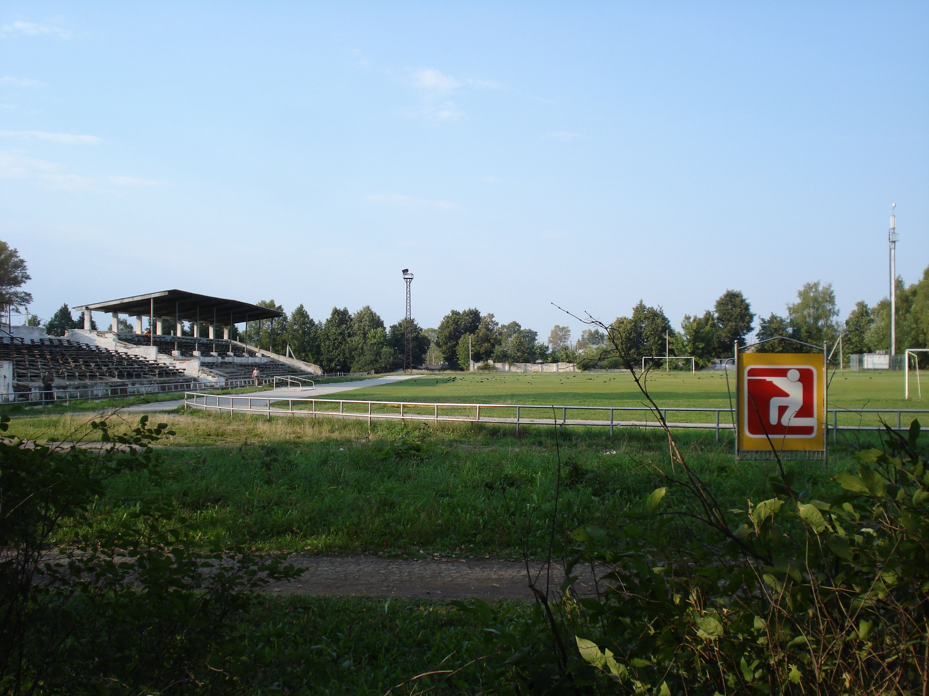 Ясногорский стадион (Тульская область)